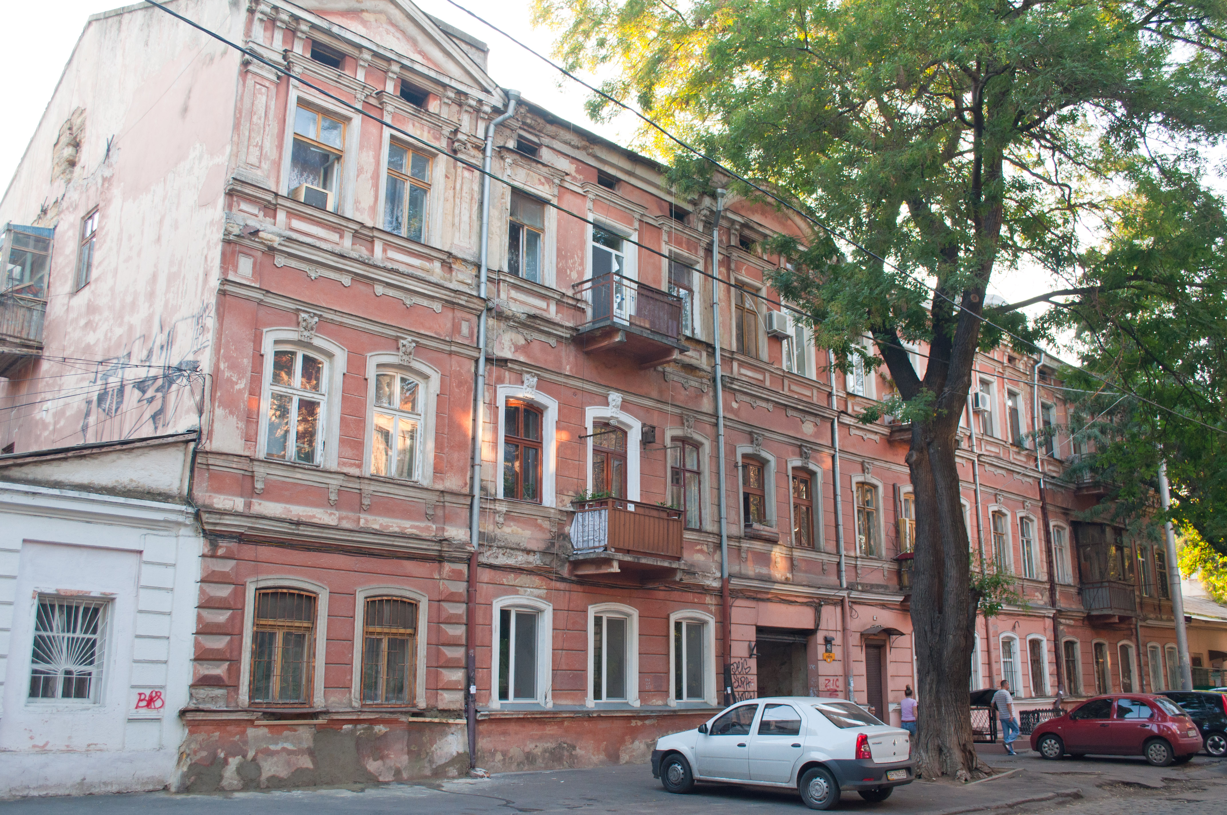 Будинок, в якому жив А.З. Коздоба - хірург, професор